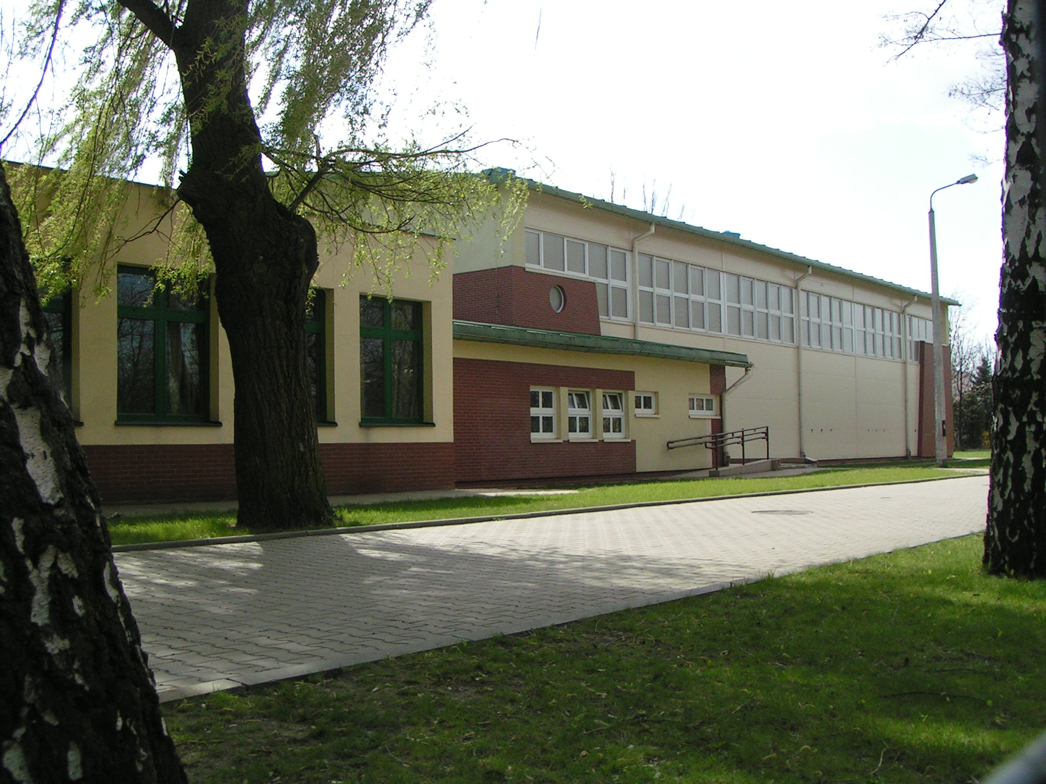 Zespół szkół z Oddziałami Integracyjnymi nr. 80 w Warszawie na osiedlu Gołąbki